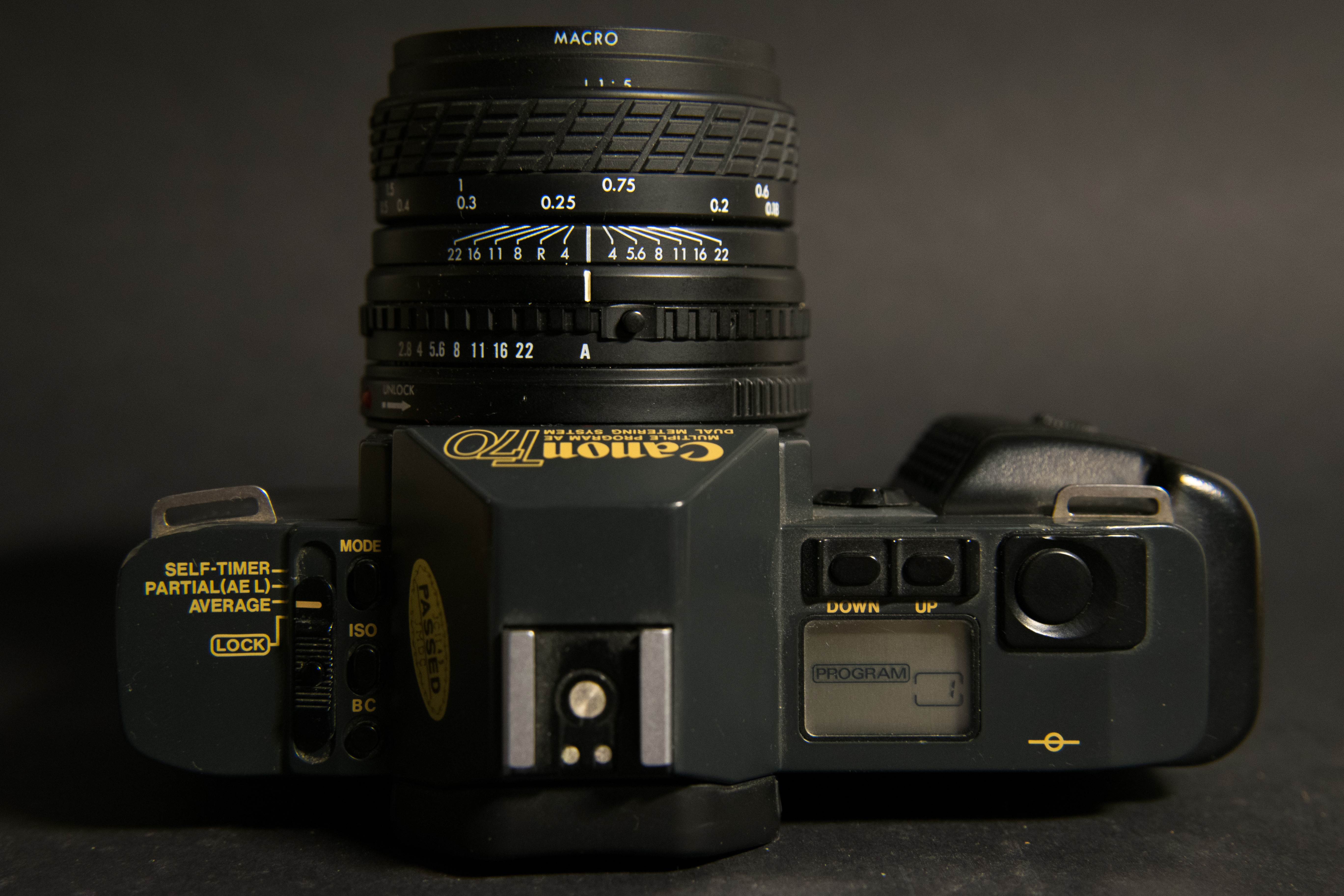 Canon T70 von oben mit Sigma 25mm Optik